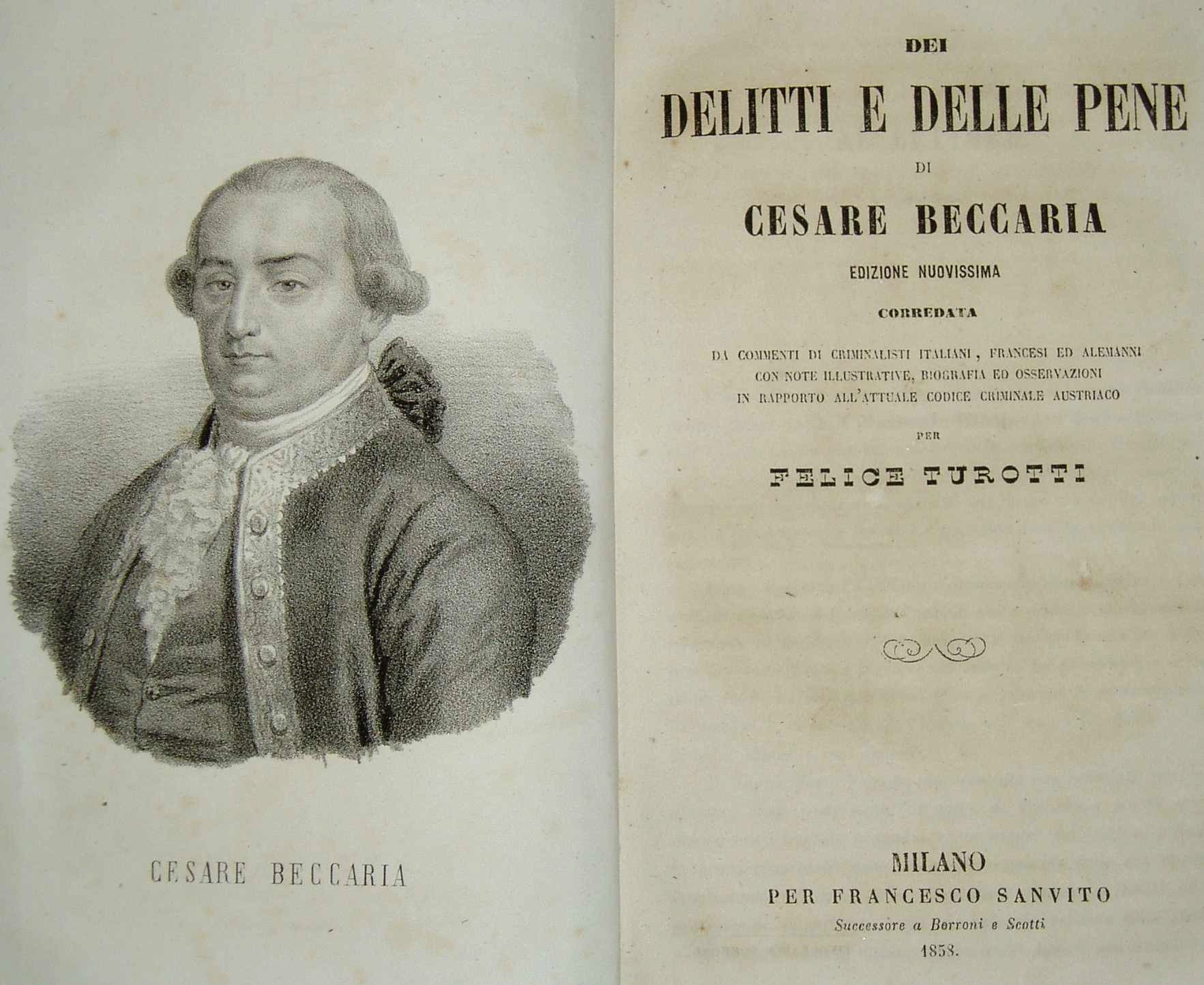 Cesare Beccaria in his book Dei delitti e delle pene (late edition)